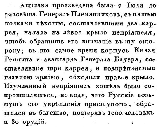 Ход сражения при Ларге. "Картина войнъ Россіи съ Турціею въ царствованія императрицы Екатерины II и императора Александра I : Пер. с фр. Ч. 1 / Соч. ген.-м. Д.П. Бутурлина." - Санкт-Петербургъ : тип. Имп. Воспитат. дома, 1829. Ч. 1, стр. 37